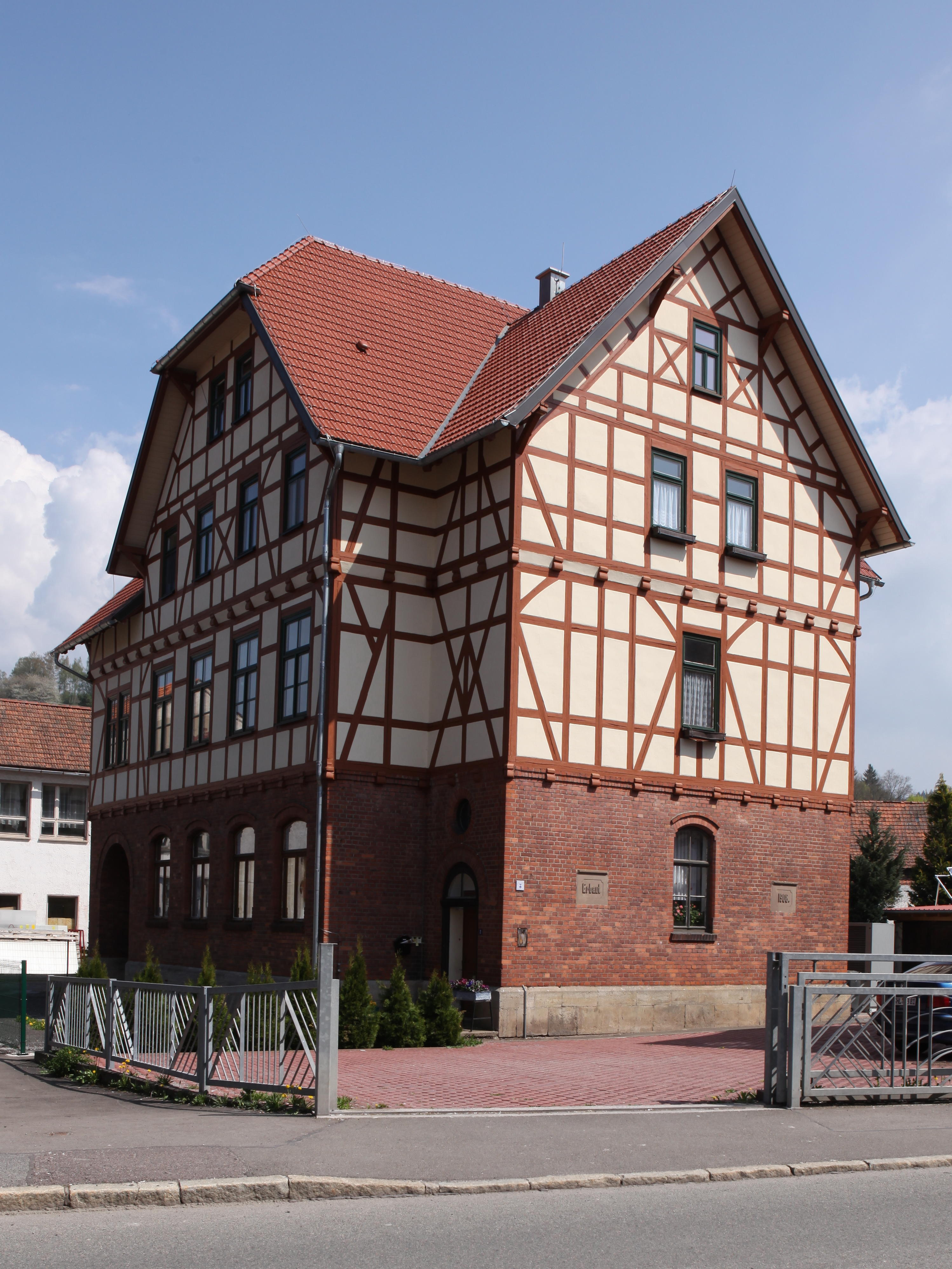 Ehemalige Schule von 1908 in Fachwerk , in Dietzhausen, Ot von Suhl